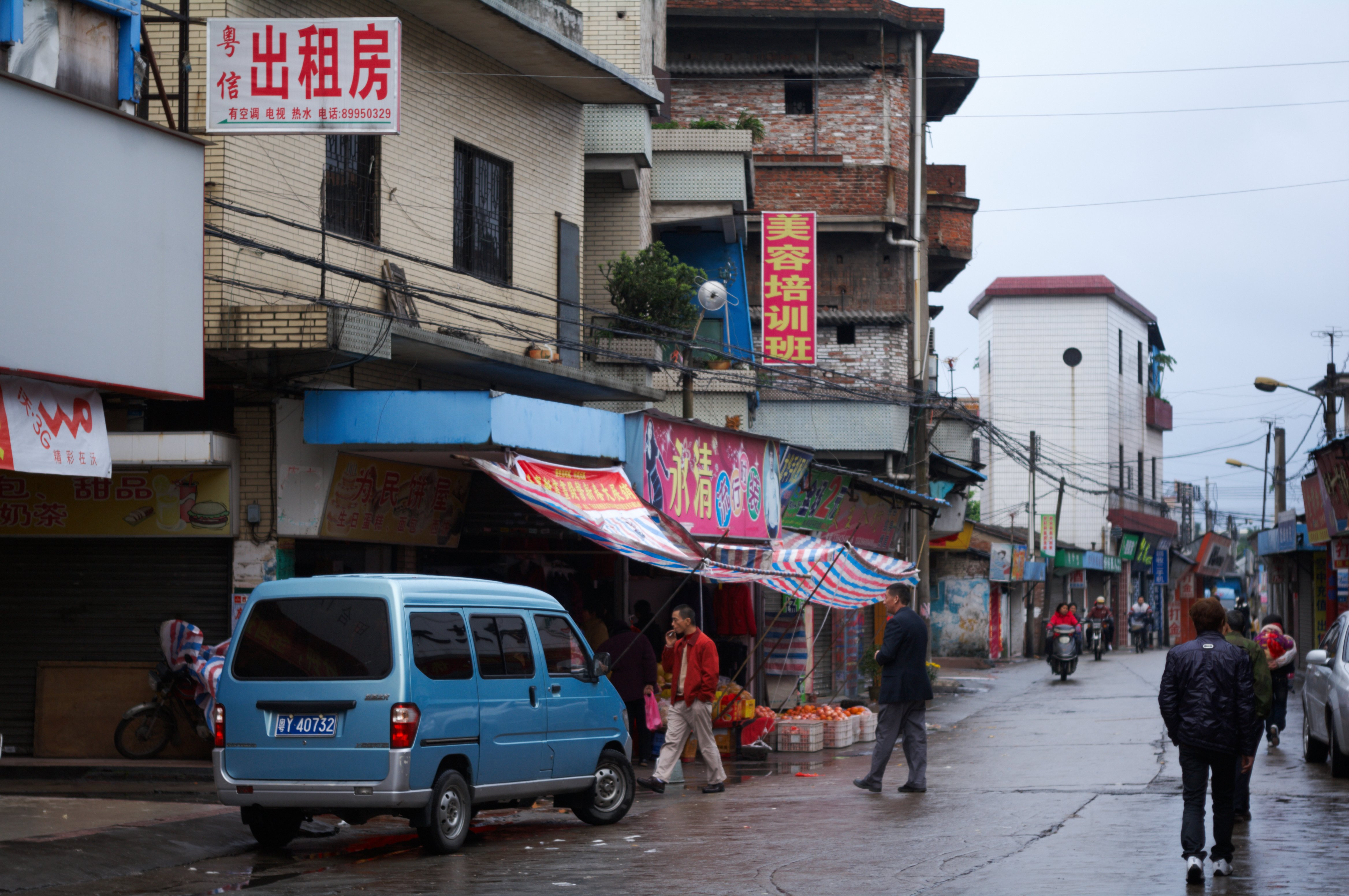 位于南海桂城街道的一个城中村